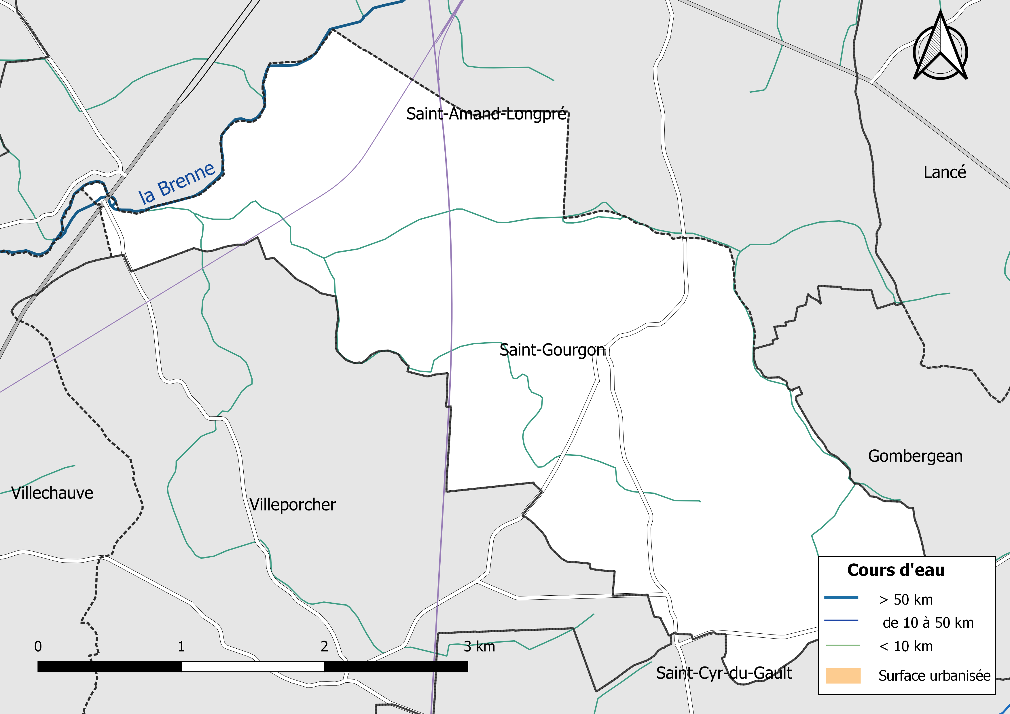 Carte du réseau hydrographique de la commune de Saint-Gourgon (Loir-et-Cher, France).